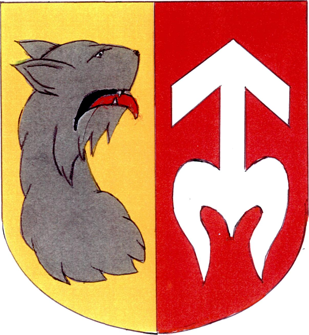 Znak obce Přestavlky u Čerčan